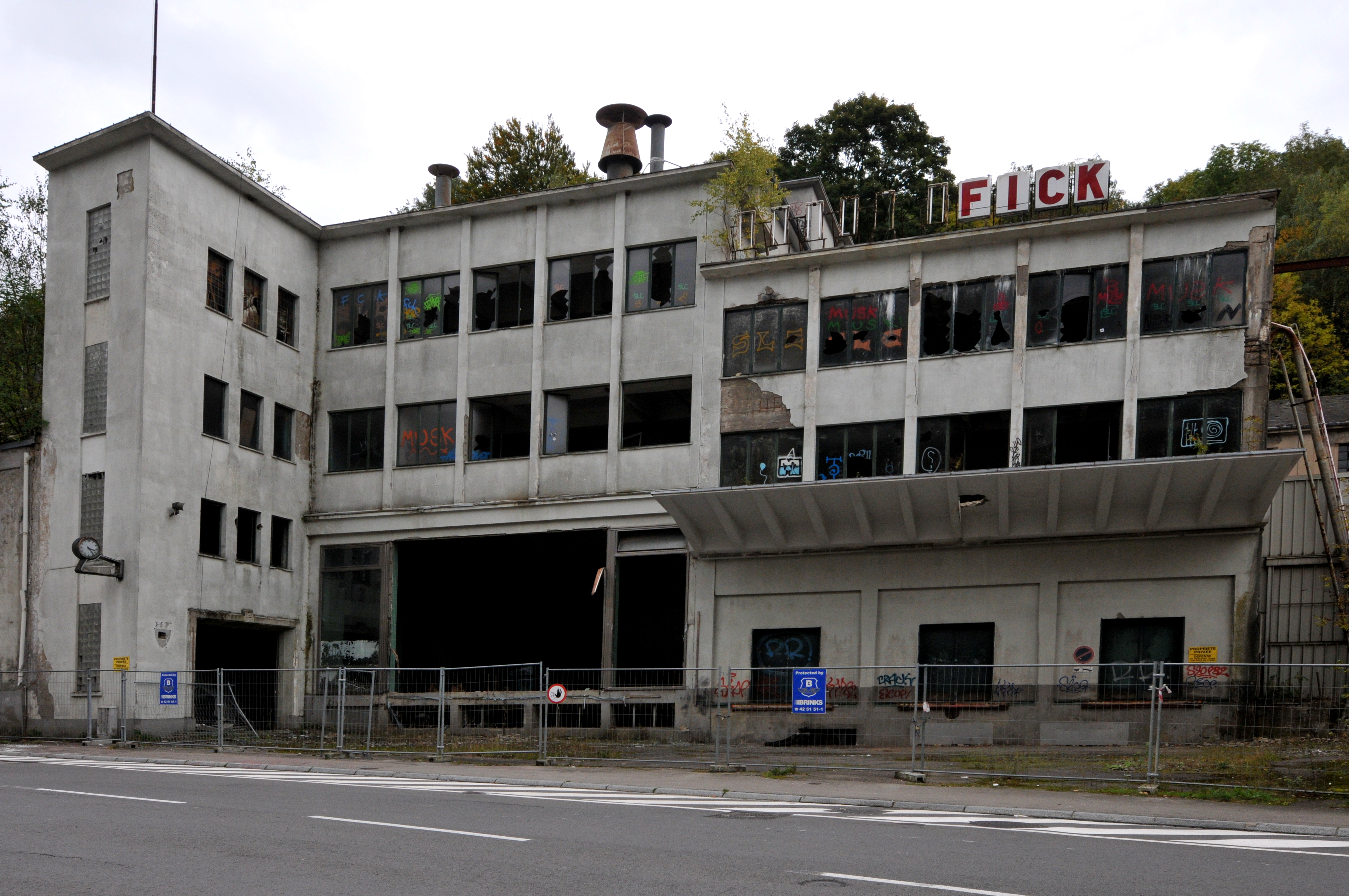 Déi fréier Henri Funck-Brauerei am stader Neiduerf verfält zanter den 1980er Joren. An der Tëschenzäit gëtt mam Numm Scrabble gespillt